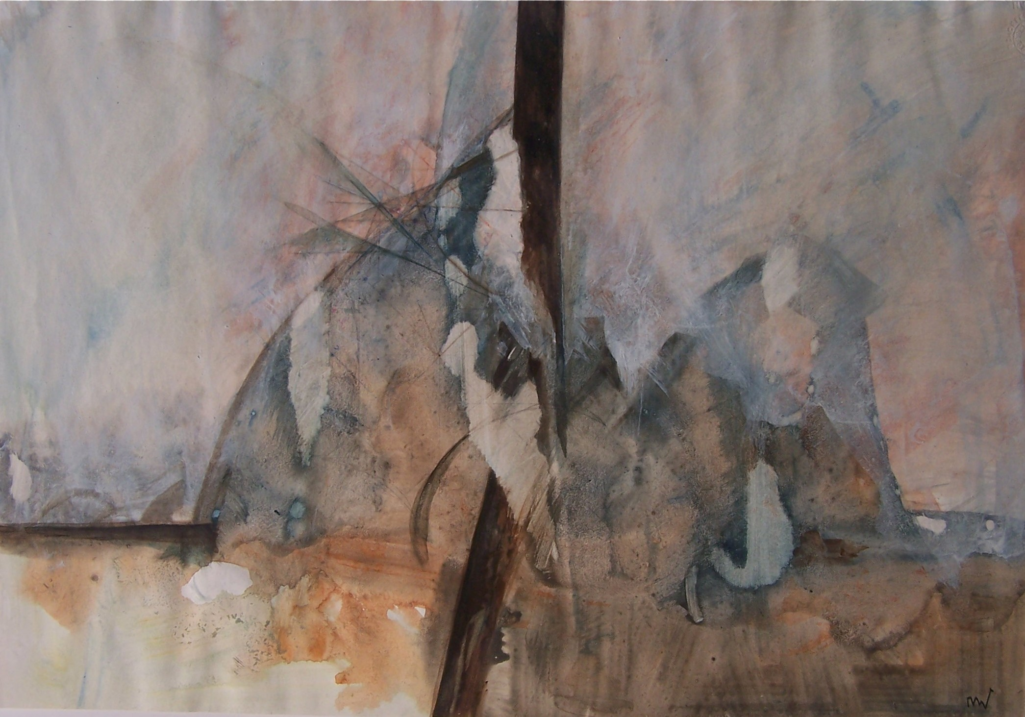 Moje Menhardt, Ohne Titel, Mischtechnik auf Papier, recto sign,MW,gerahmt, 27,3x39,3cm